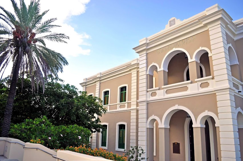 Fachada del Edificio Histórico del Conservatorio de Música de Puerto Rico. Antiguamente Colegio de las hermanas del Sagrado Corazón de María, posterior Asilo de Niñas de Miramar y futuro Conservatorio de Música, el edificio fue diseñado y construido por el Ingeniero Tulio Larrínaga. Localizado a lo largo del antiguo Camino Real - hoy Avenida José Ponce de León